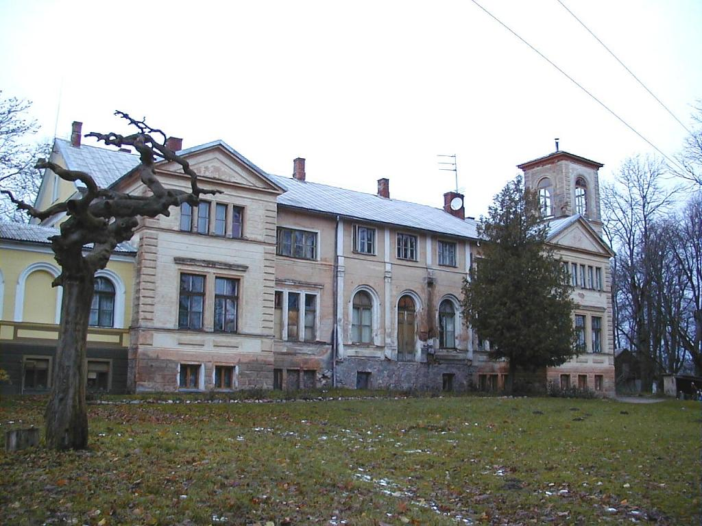 Padures (pie Aizputes) pils 2001-11-10